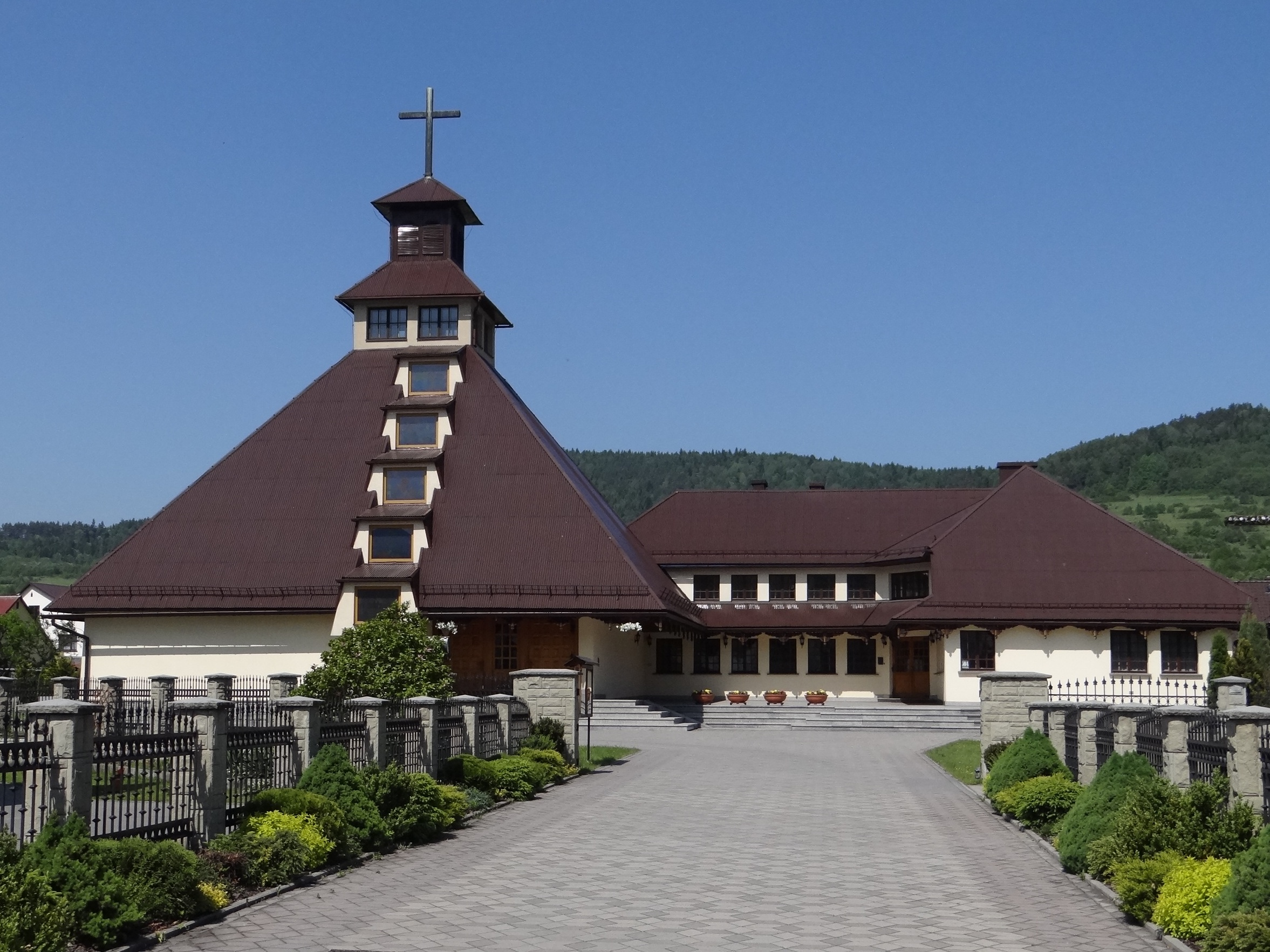 Kościół w Białce